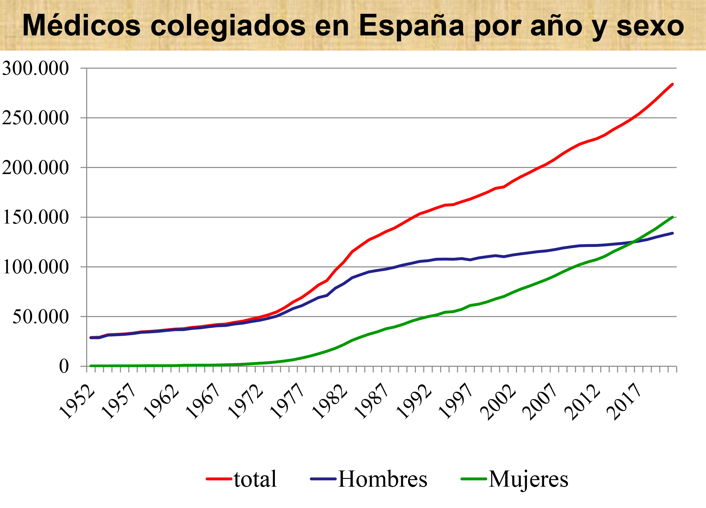 Gráfica del número de médicos colegiados en España entre 1994 y 2018.